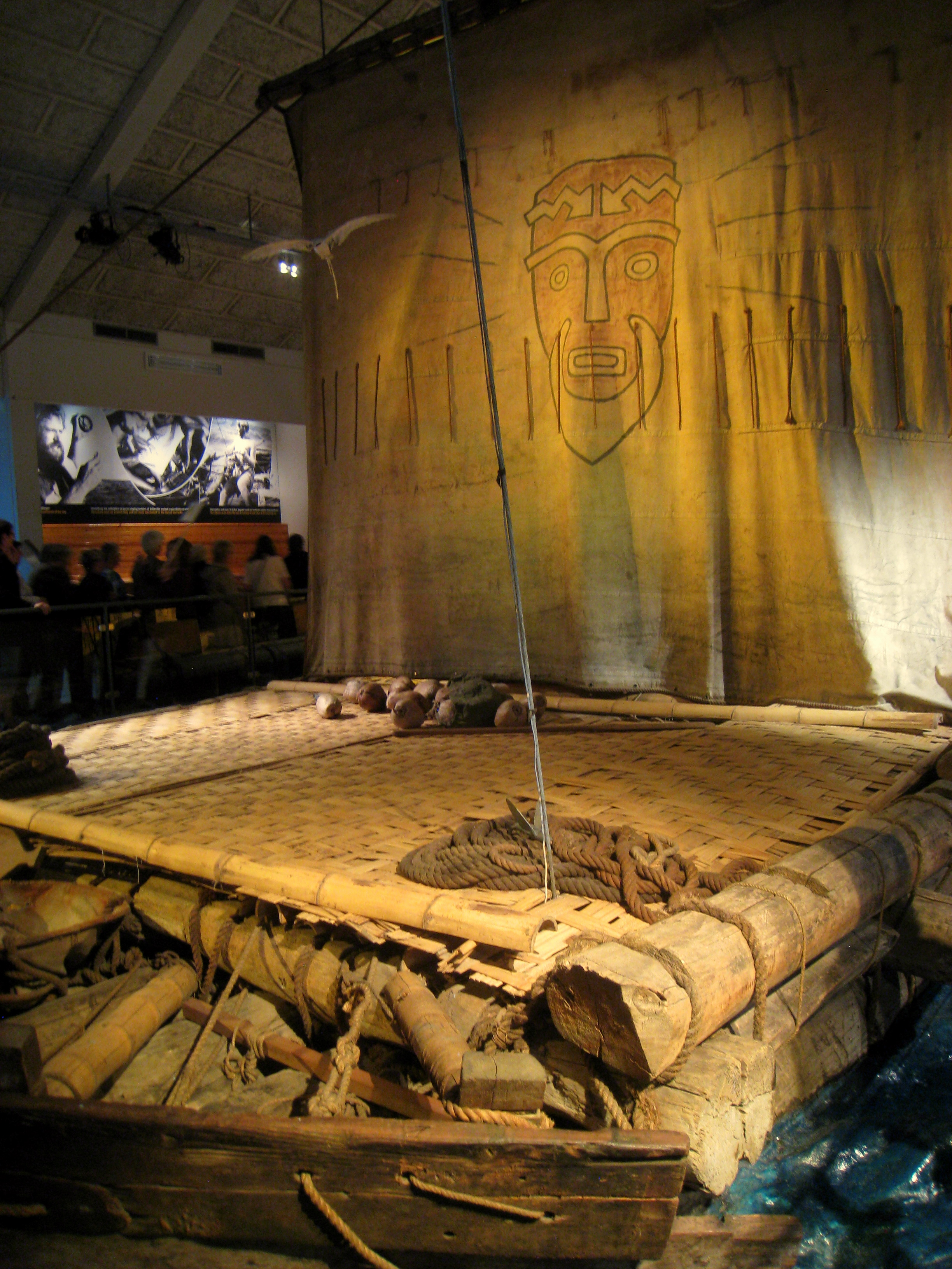 Kon-Tiki raft, in Kon-Tiki Museum, Oslo, Norway.